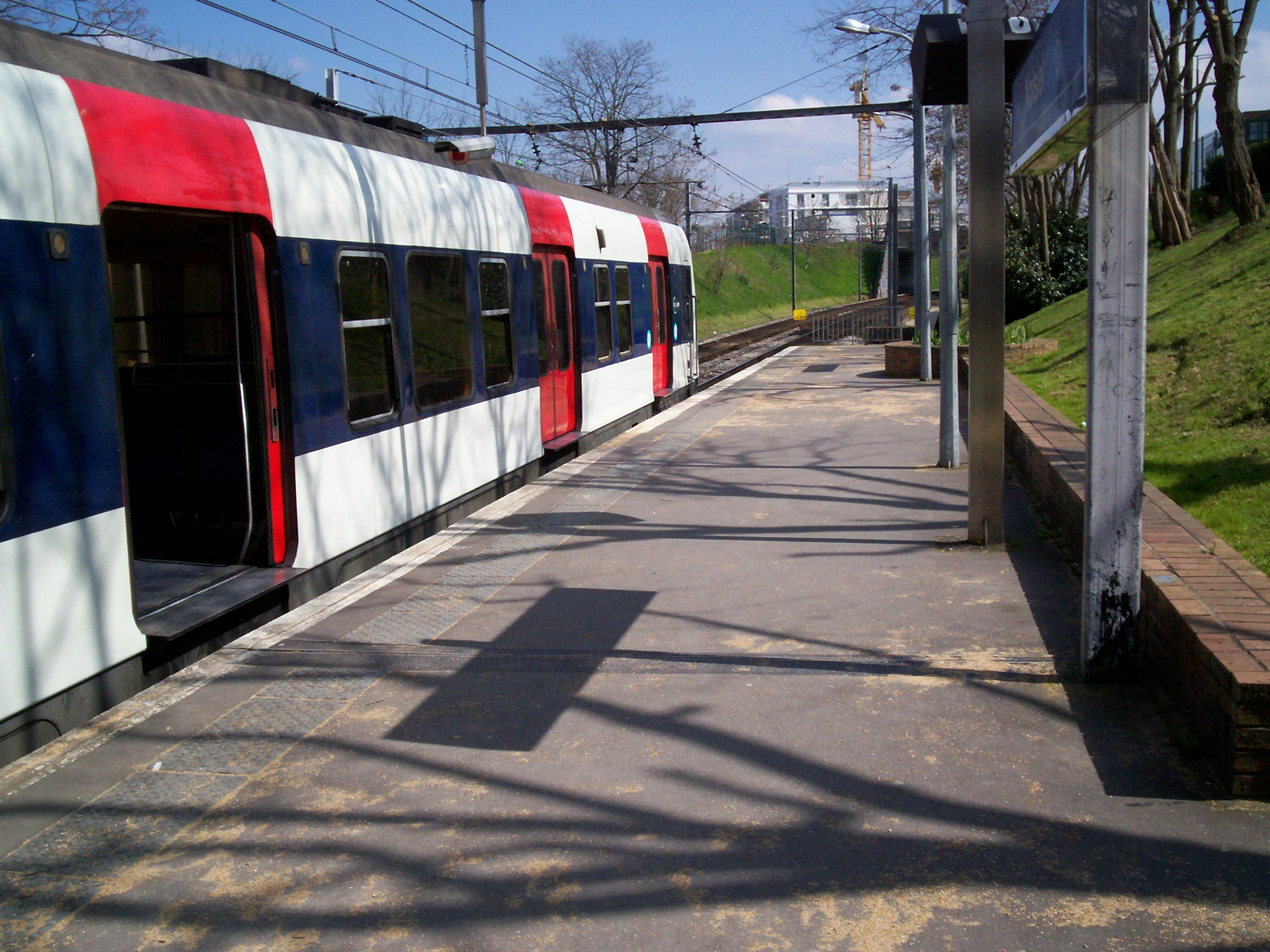 MI 84 - Gare de Noisiel